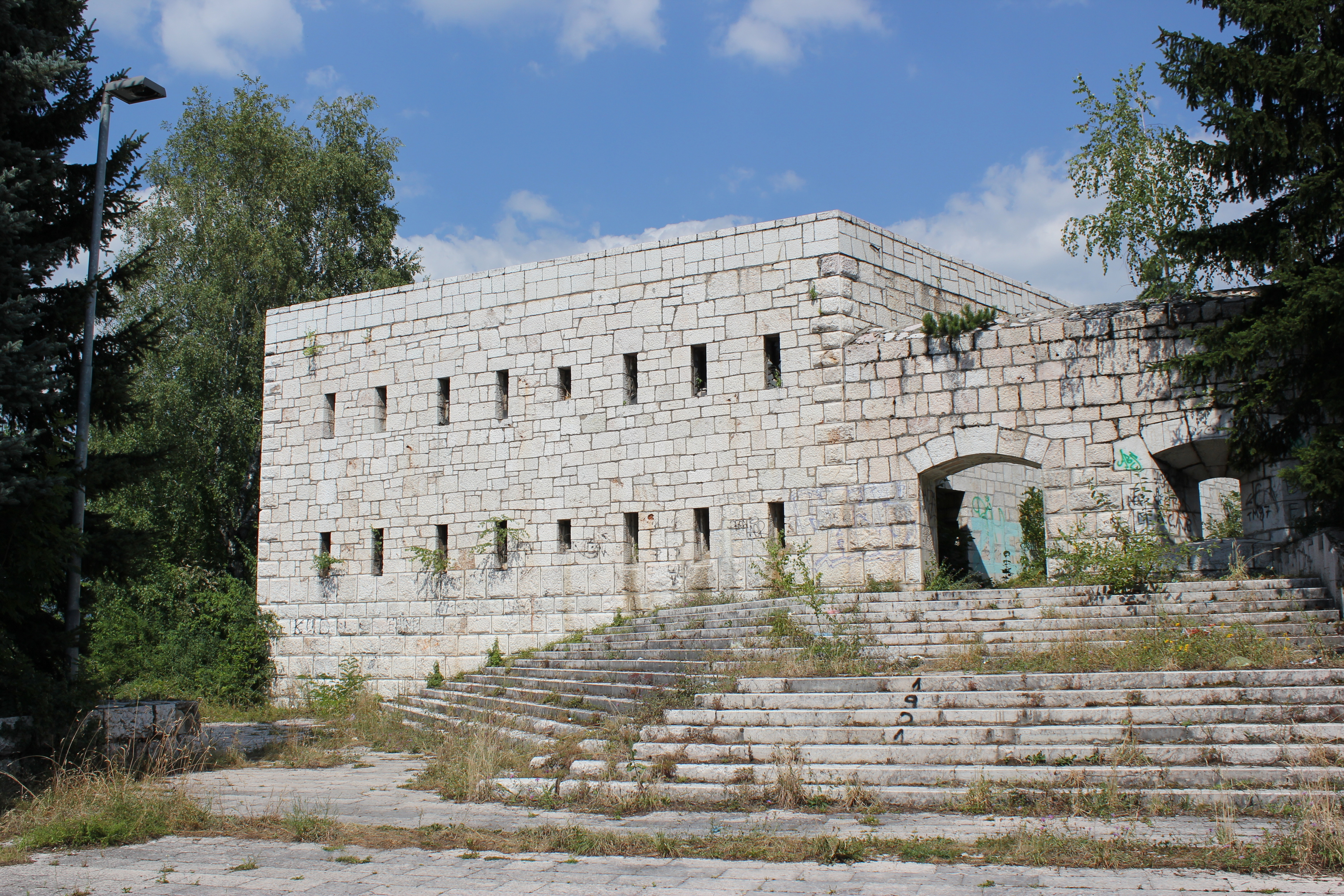 Die Festung Vraca im Südwesten von Sarajevo.